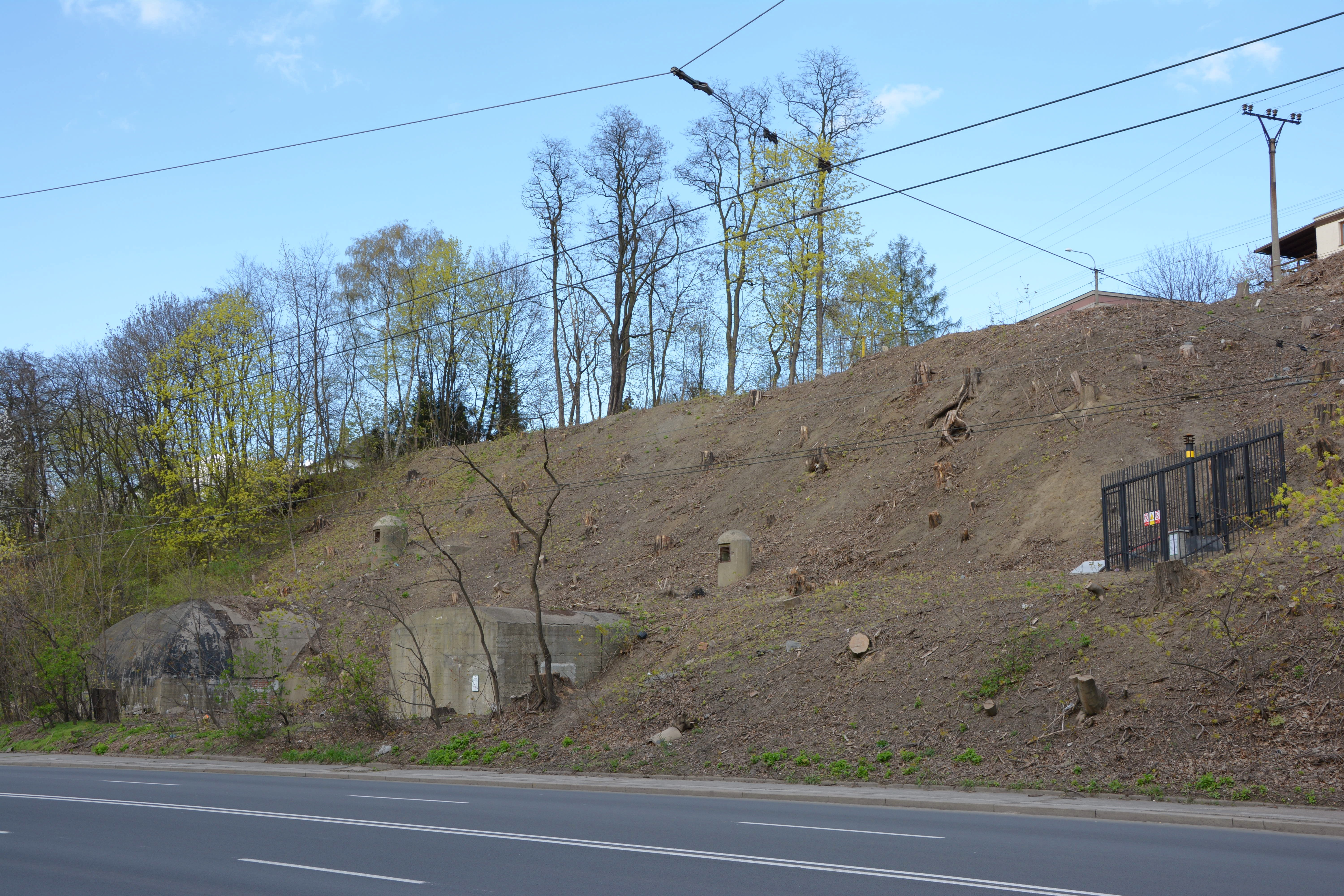 Jaklovec, vpravo ústí Jaklovecké dědičné štoly, uprostřed ústí štoly sloje Jan, v popředí Bohumínská ulice; Slezská Ostrava